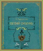 Издание оперы «Евгений Онегин» конца XIX в.фото